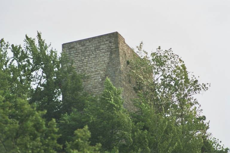 Ruine Wartstein im Lautertal (Deutschland)